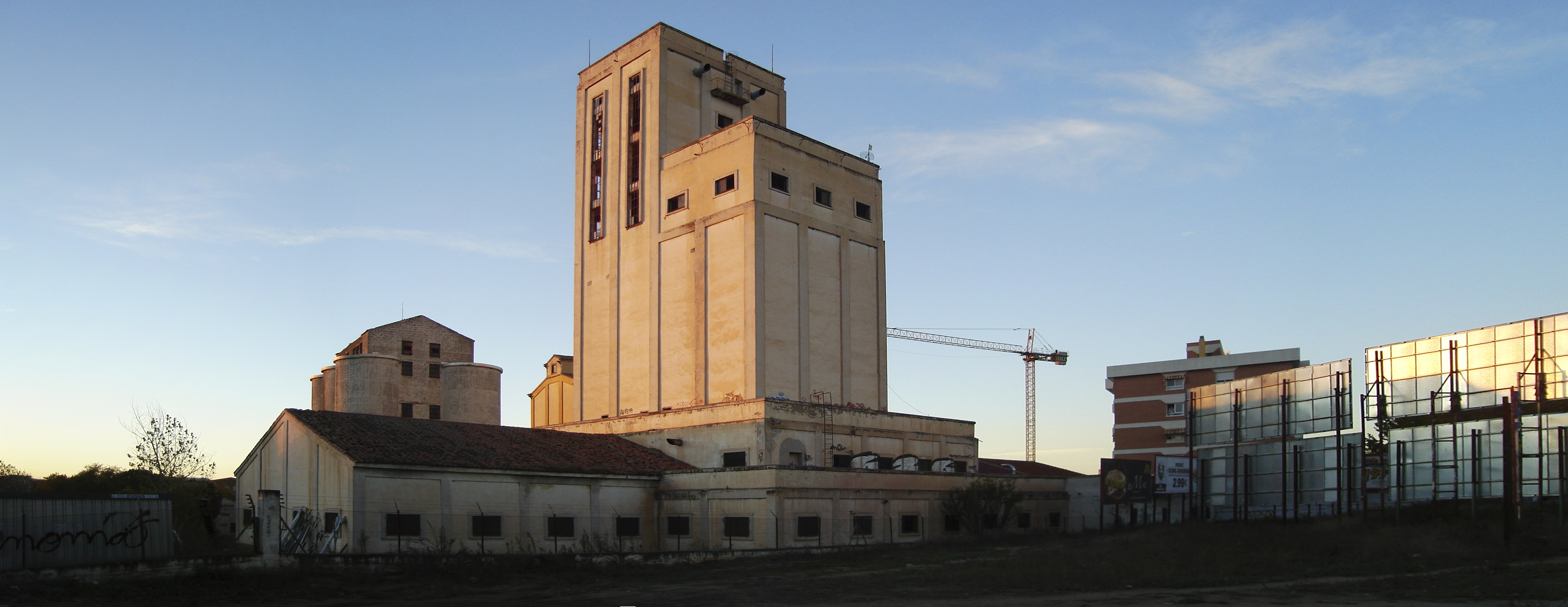 /// Sony DSC-s600 /// Camera RAW & Photoshop Silos en Ciudad Real, España.